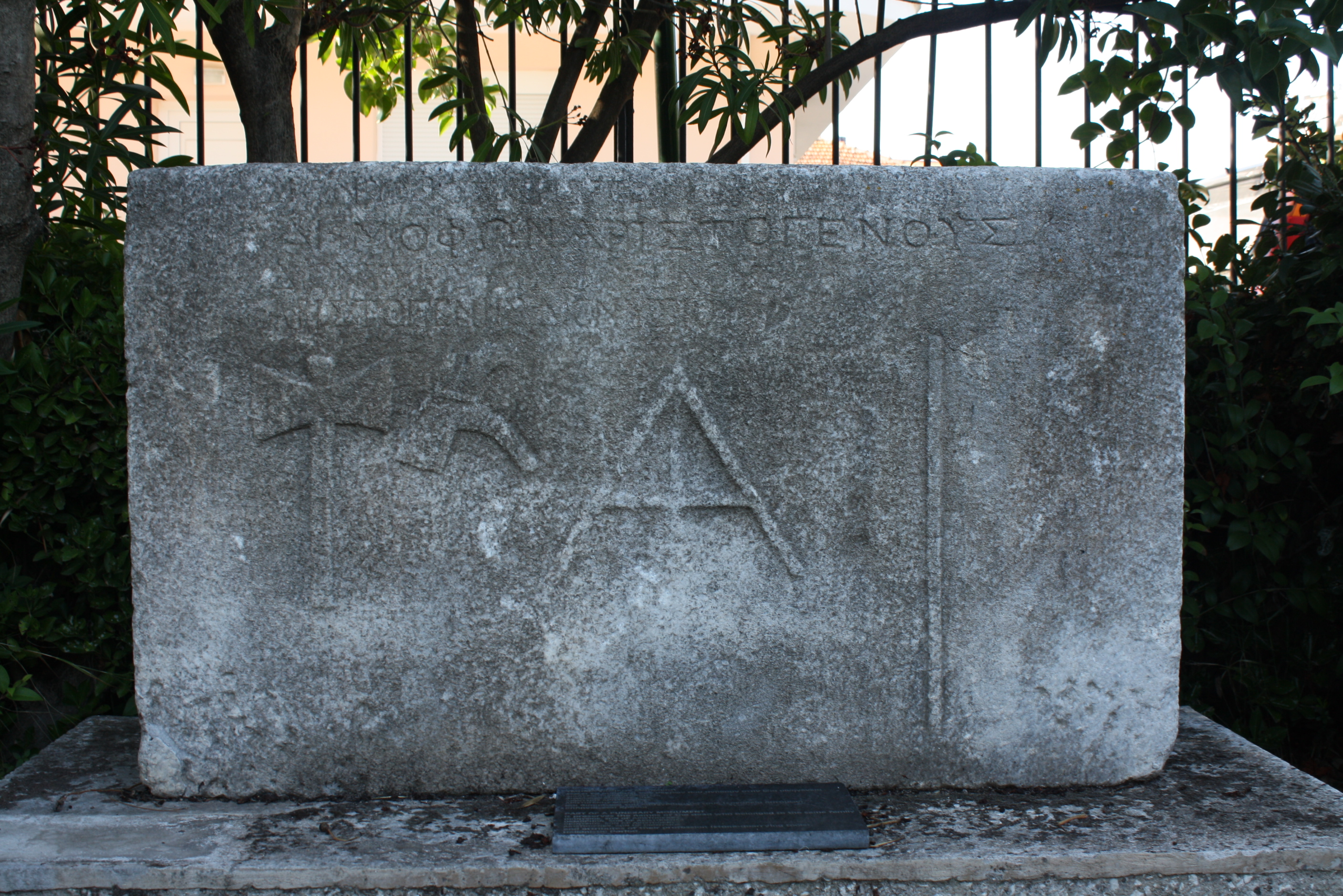 Auf Thasos gefundener Grabstein von Dionysos, Sohn des Aristogenes, Demophon, Sohn des Aristogenes, Dionysios, Sohn des Aristogenes und Aristogenes, Sohn des Dionysios mit den Werkzeugen ihres Berufes als Steinmetzen